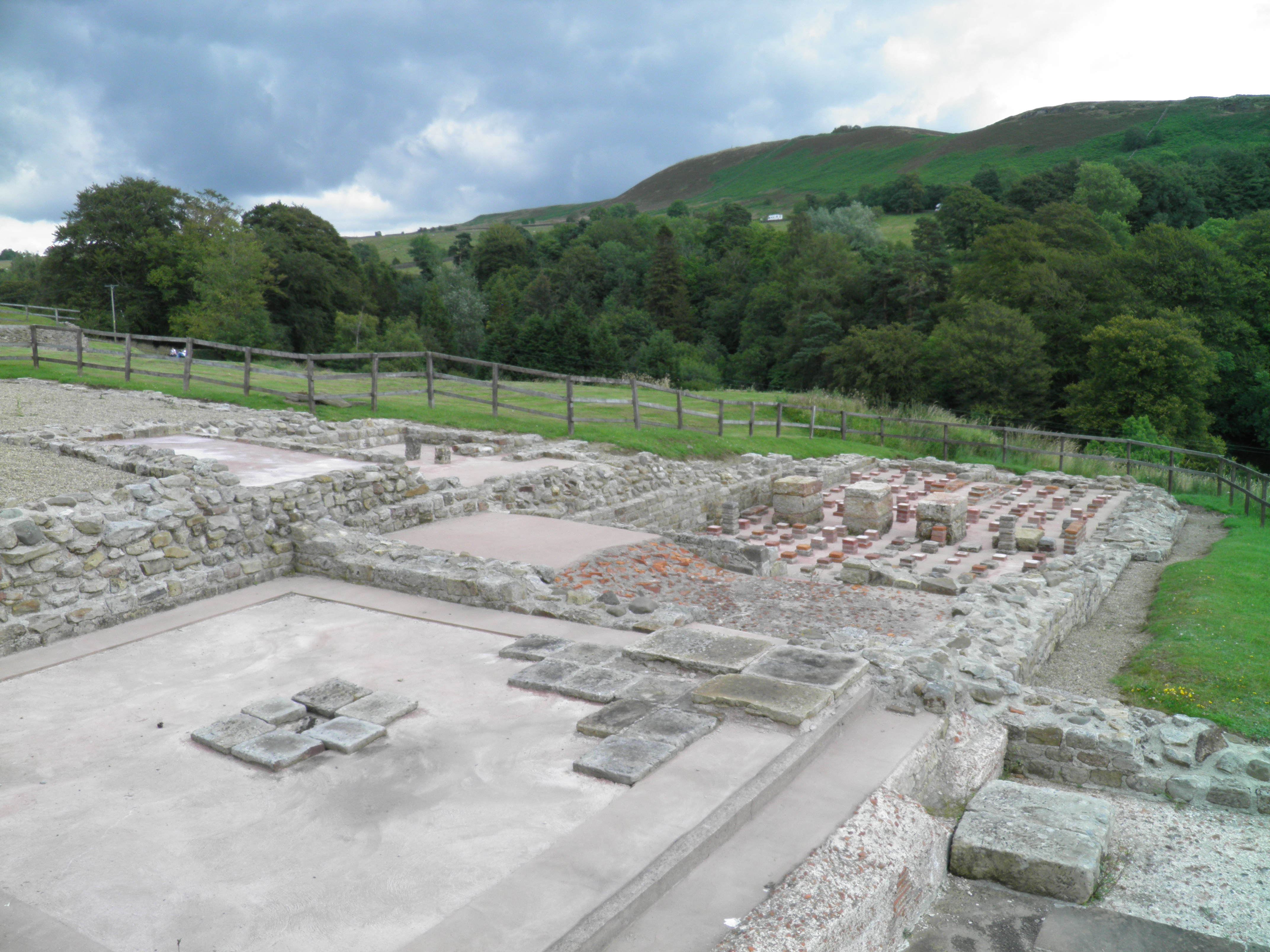 Vindolanda fort, UK